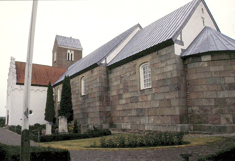 Tånum Kirke, Randers Kommune, set fra sydøst